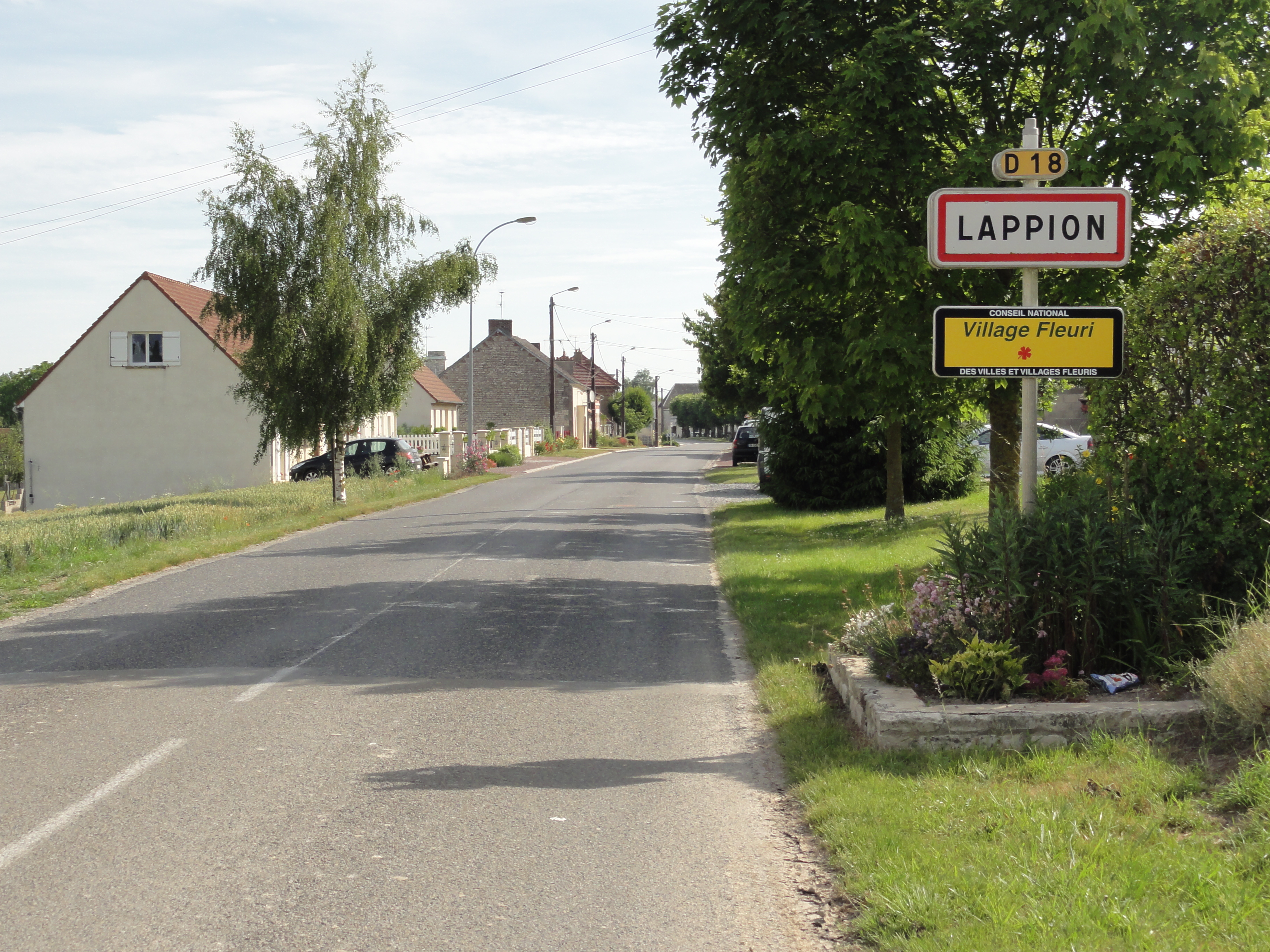 Lappion (Aisne) city limit sign